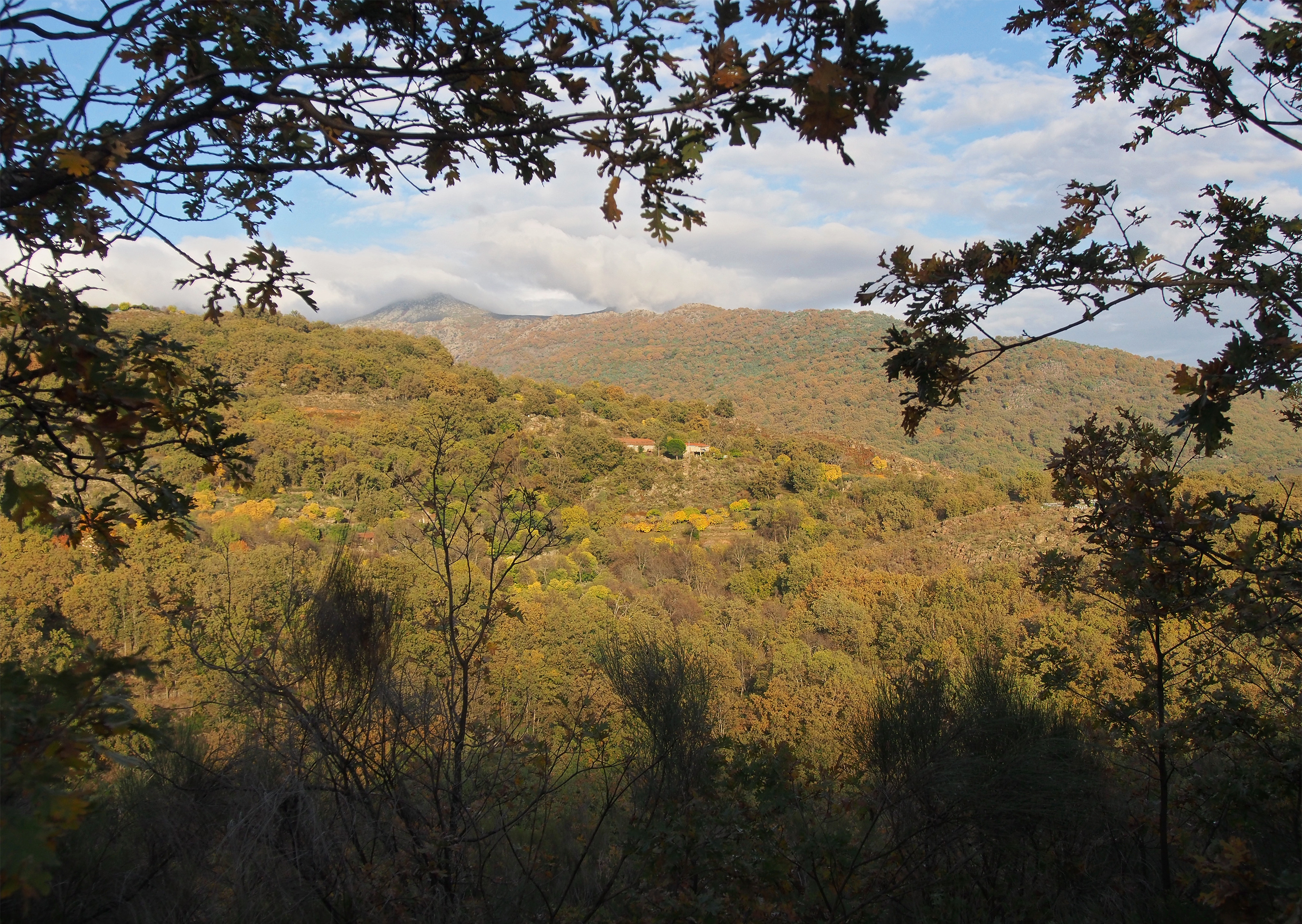 Quercus pirenaica en otoño. Losar de la Vera (Cáceres, España).